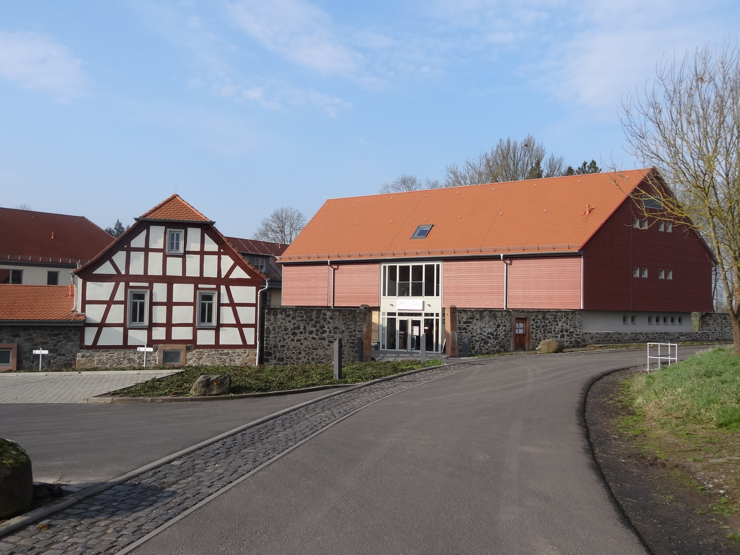 Limesinformationszentrum Hof Grass und Stadtarchiv Hungen